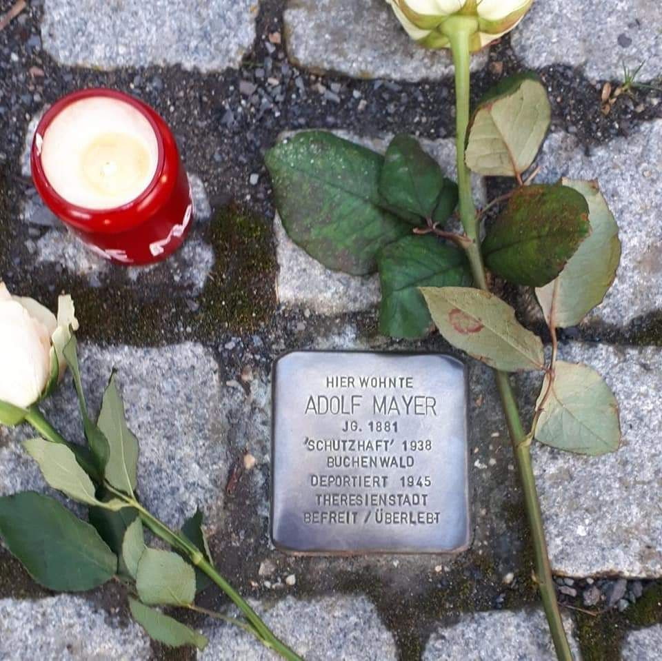 Stolperstein im Gedenken an Adolf Mayer in der Kastanienallee in Pößneck